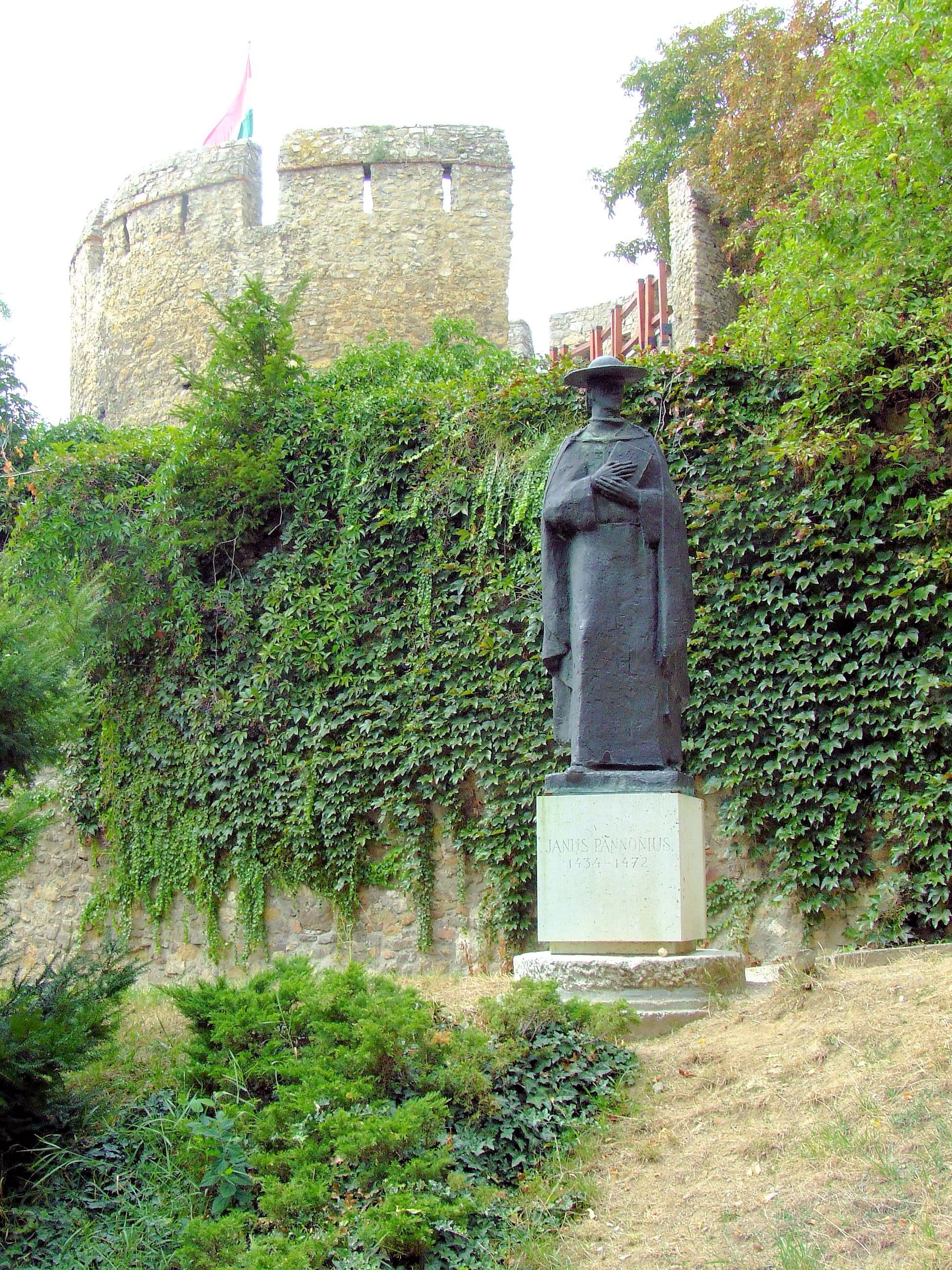 Janus Pannonius szobra Pécsen. Borsos Miklós alkotása (1972)